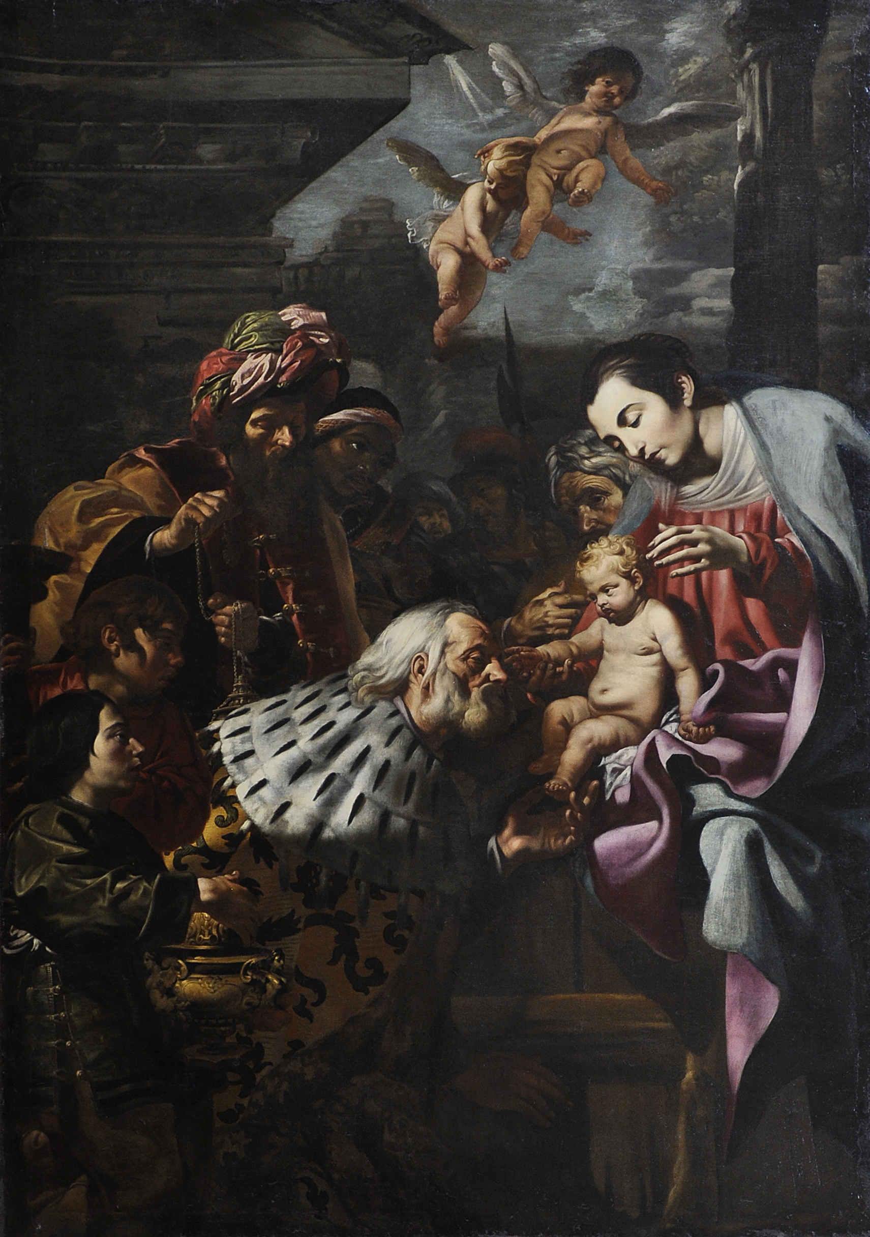 Cornelis Schut (1597-1655) Aanbidding door de Wijzen - Caen Abbaye aux Dames